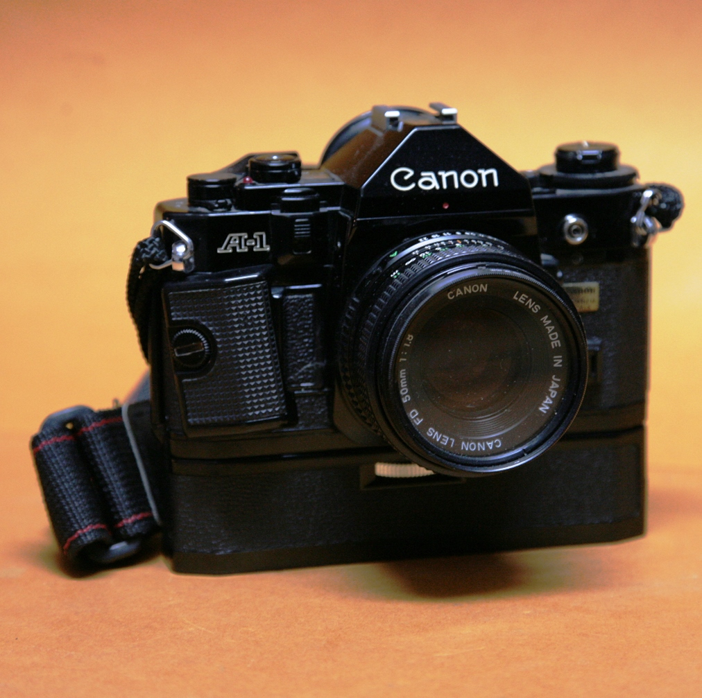 Coll. Marcè CL - Canon A1 1978-1985, prima reflex a pellicola ad offrire una modalità di esposizione automatica programmata a controllo elettronico. Otturatore in tessuto orizzontale sul piano focale, dimensioni 141 × 92 × 48 mm peso 620 g.[1]